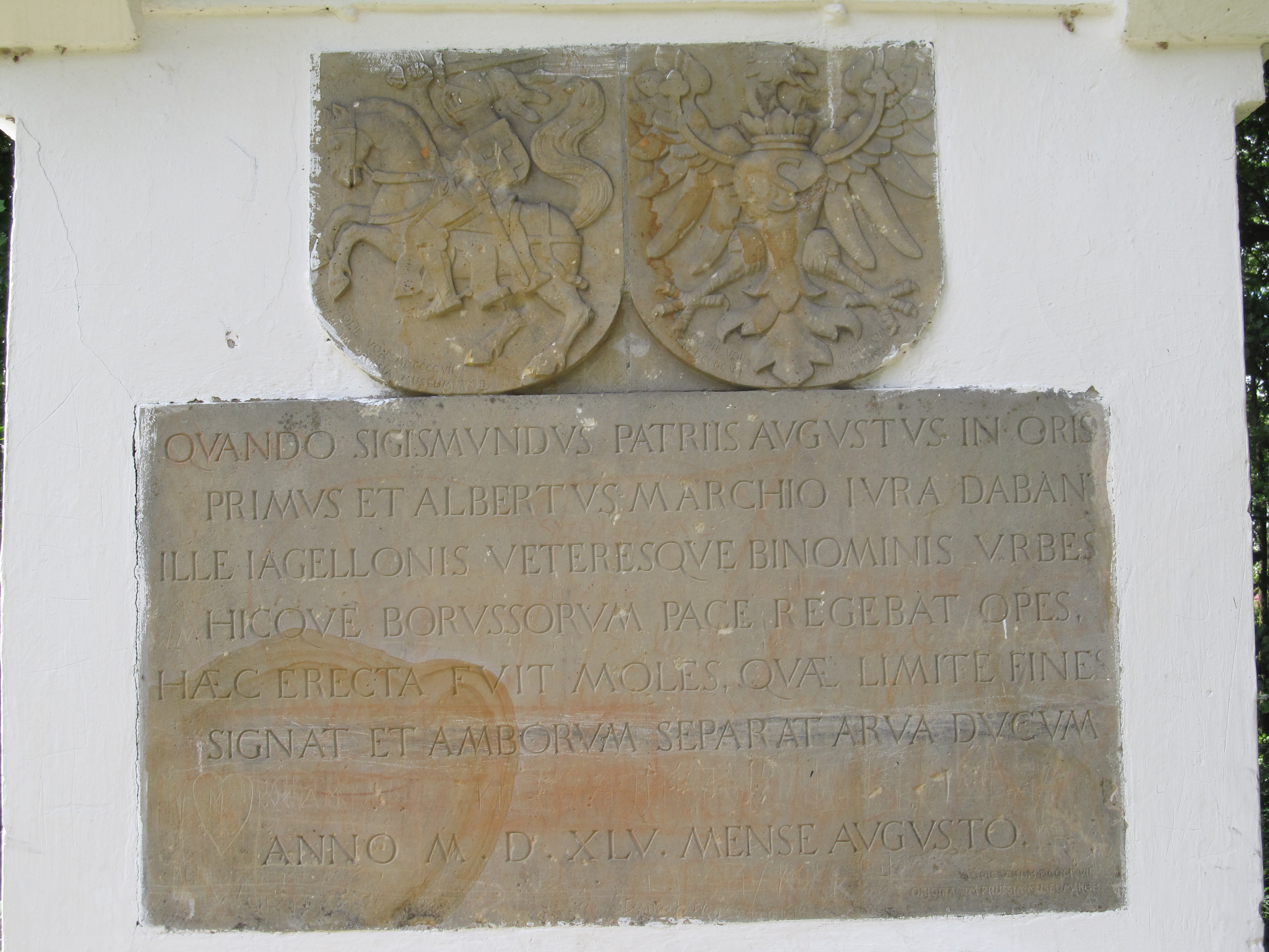 Bogusze - historyczny słup graniczny na dawnej granicy Korony Królestwa Polskiego i Prus Książęcych (zabytek nr A-586 z dn. 29.12.1964)